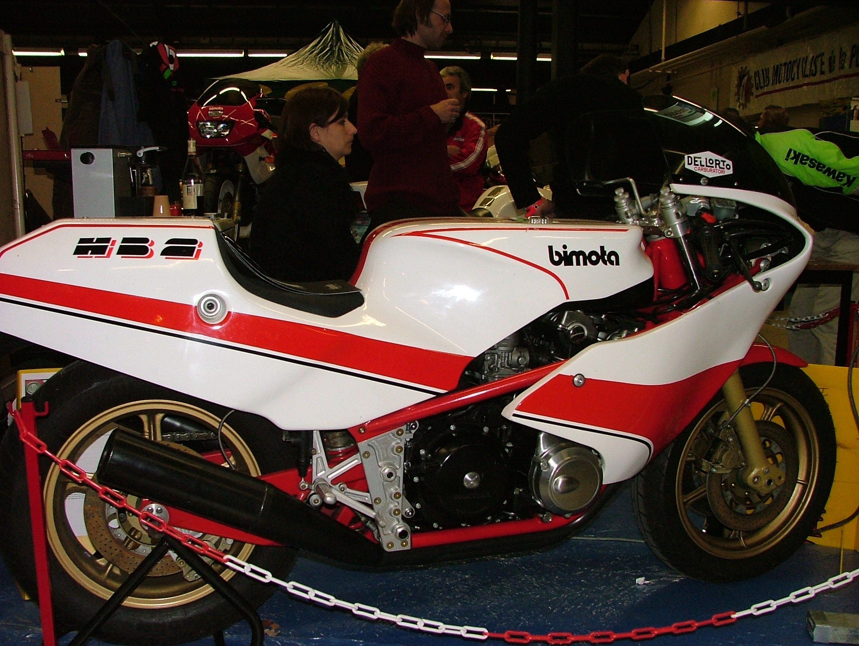 Bimota HB2